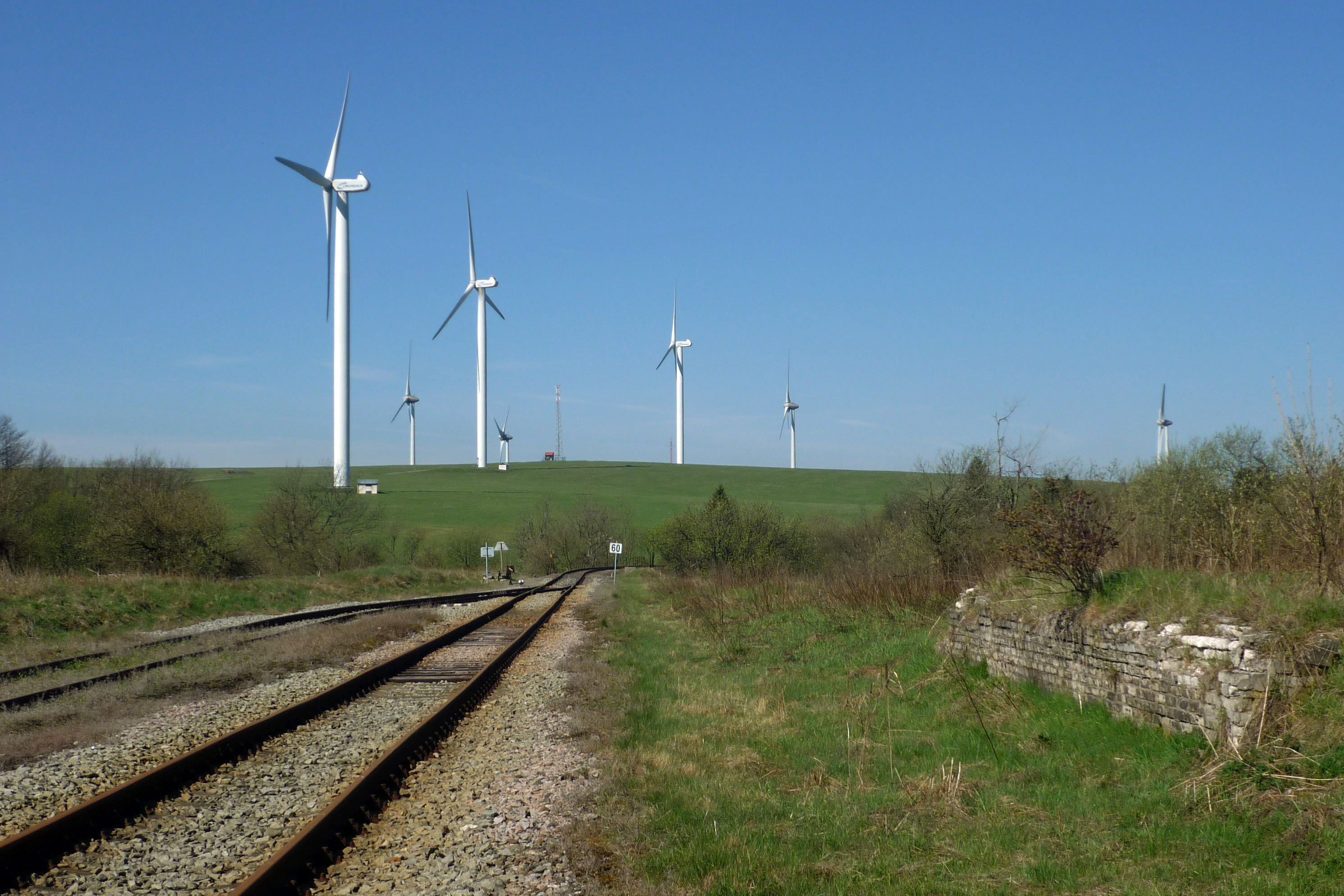 Ehem. Bahnhof Reischdorf (Rusová) der Strecke Komotau-Weipert (Chomutov-Vejprty)